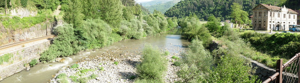 Río Aller a su paso por la localidad de Bustiello